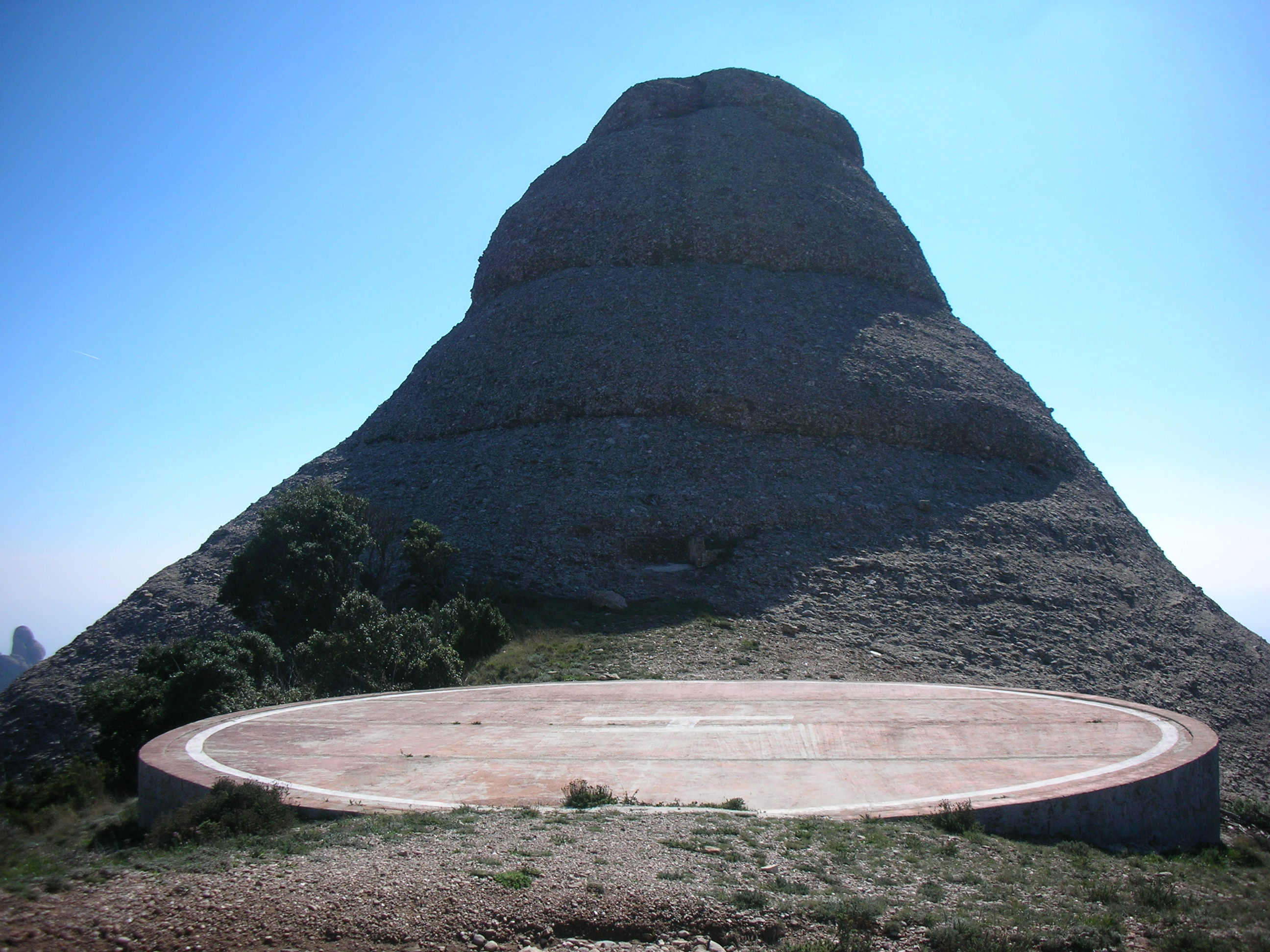 El Moro des del collet amb el Mirador del Moro, on es troba l'heliport